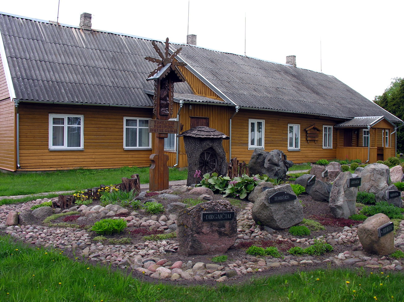 Vosiliškio bendruomenės namai 2009 m. gegužės 17 d.